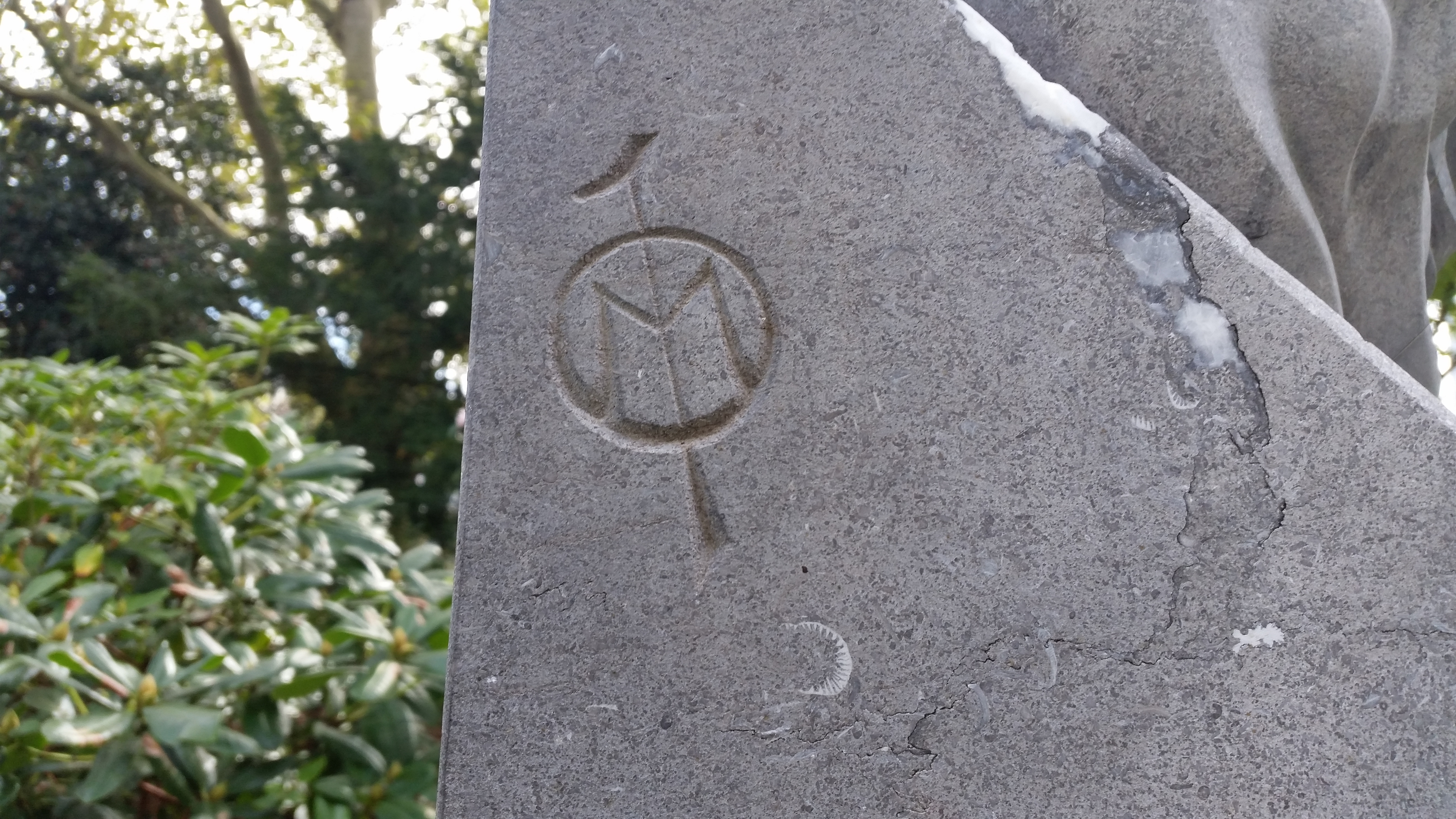 Monogram op Bust of Herman Heijermans (1935) by Joseph Mendes da Costa